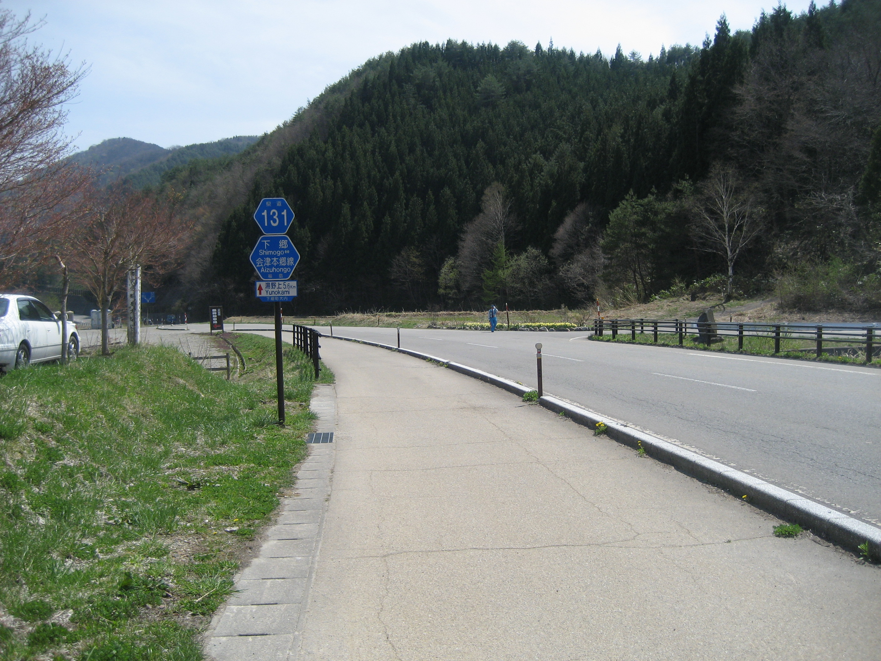 福島県道131号線下郷町内